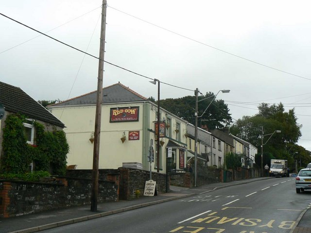 Red Cow Pub in Llwydcoed, Wales